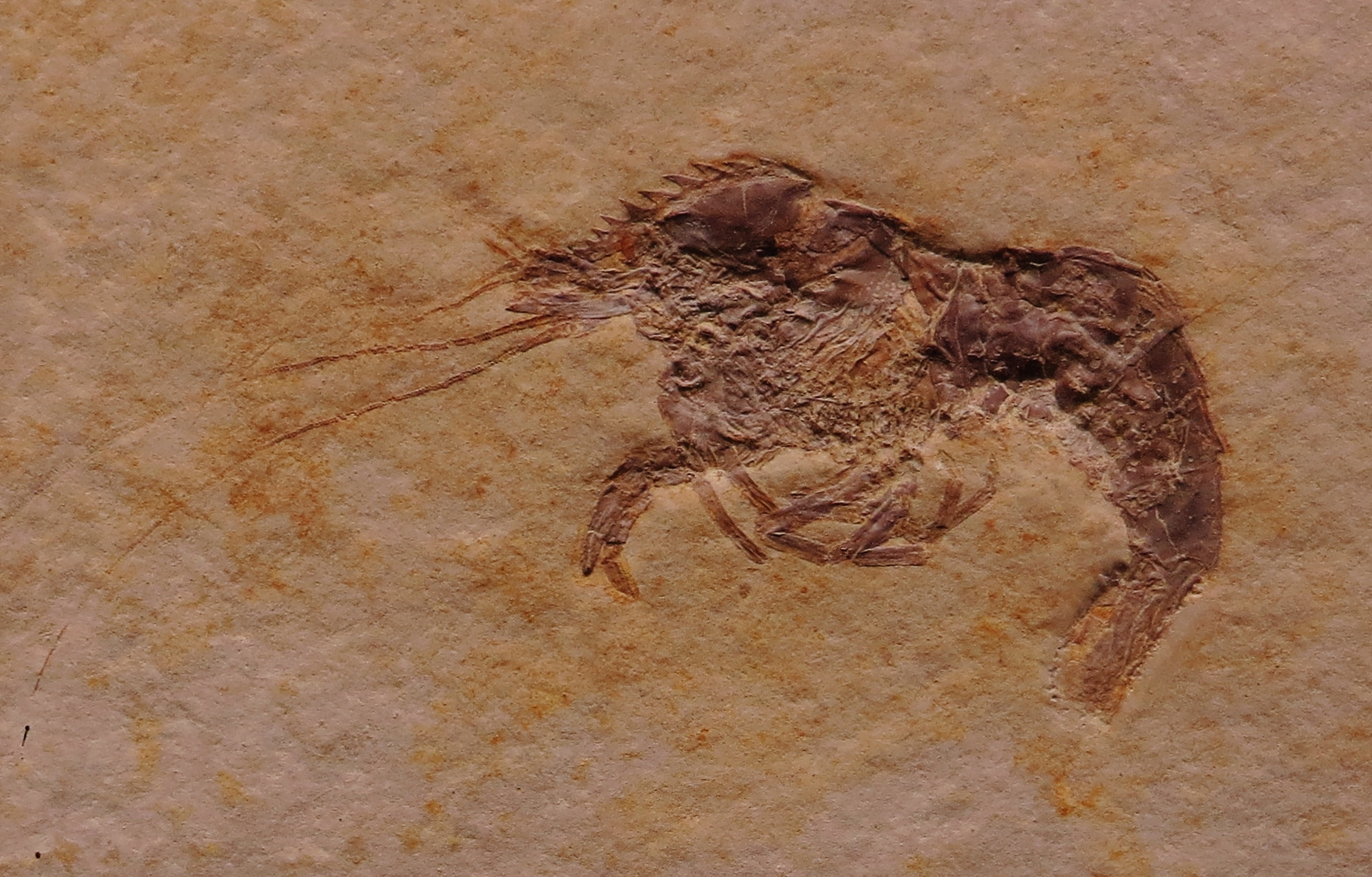 Took the picture at Museum Berger, Eichstaett